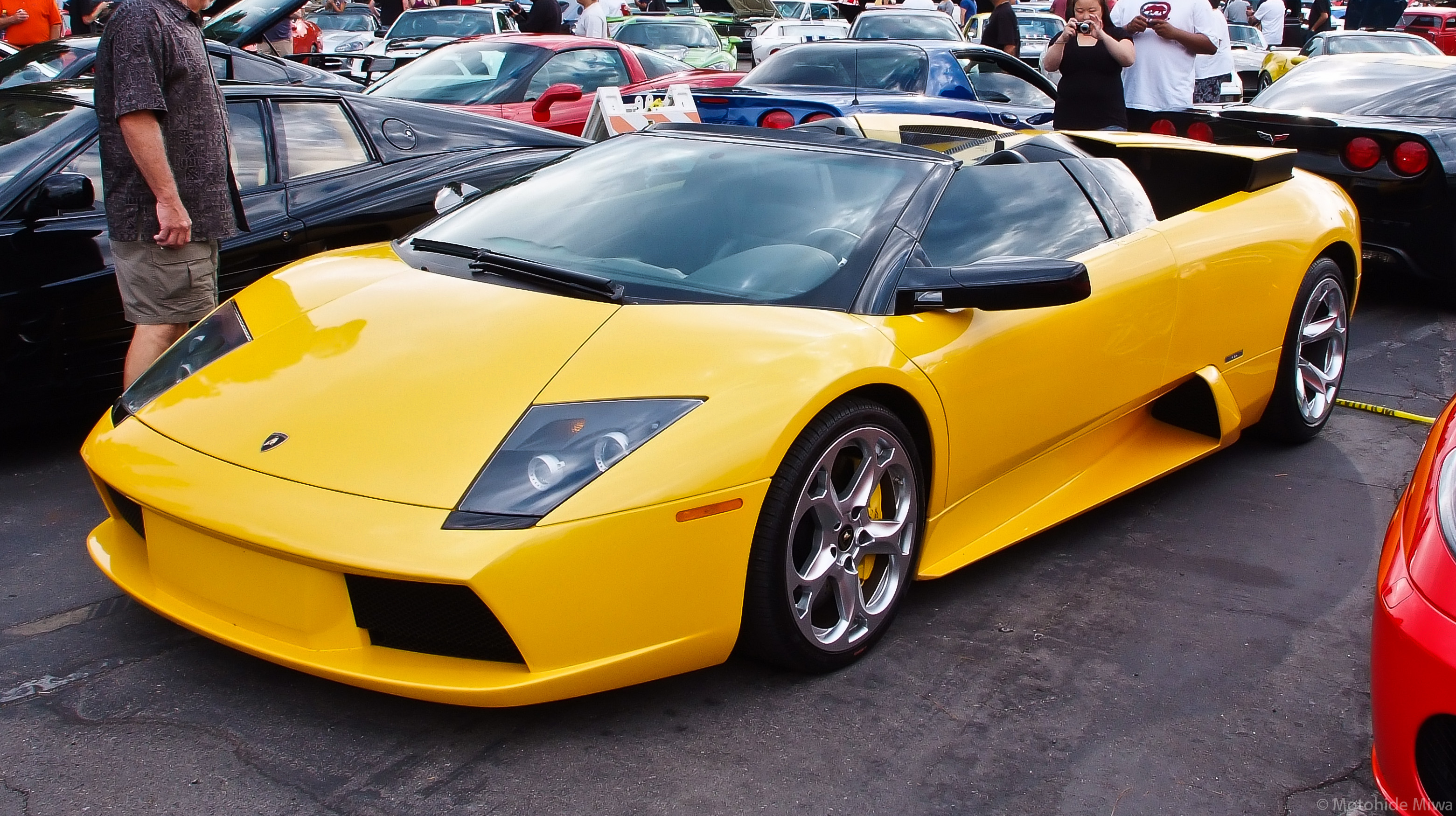 SupercarSunday-74